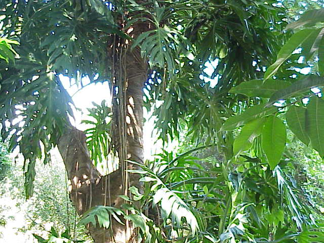 Species: Monstera deliciosa Family: Araceae Image No. 2